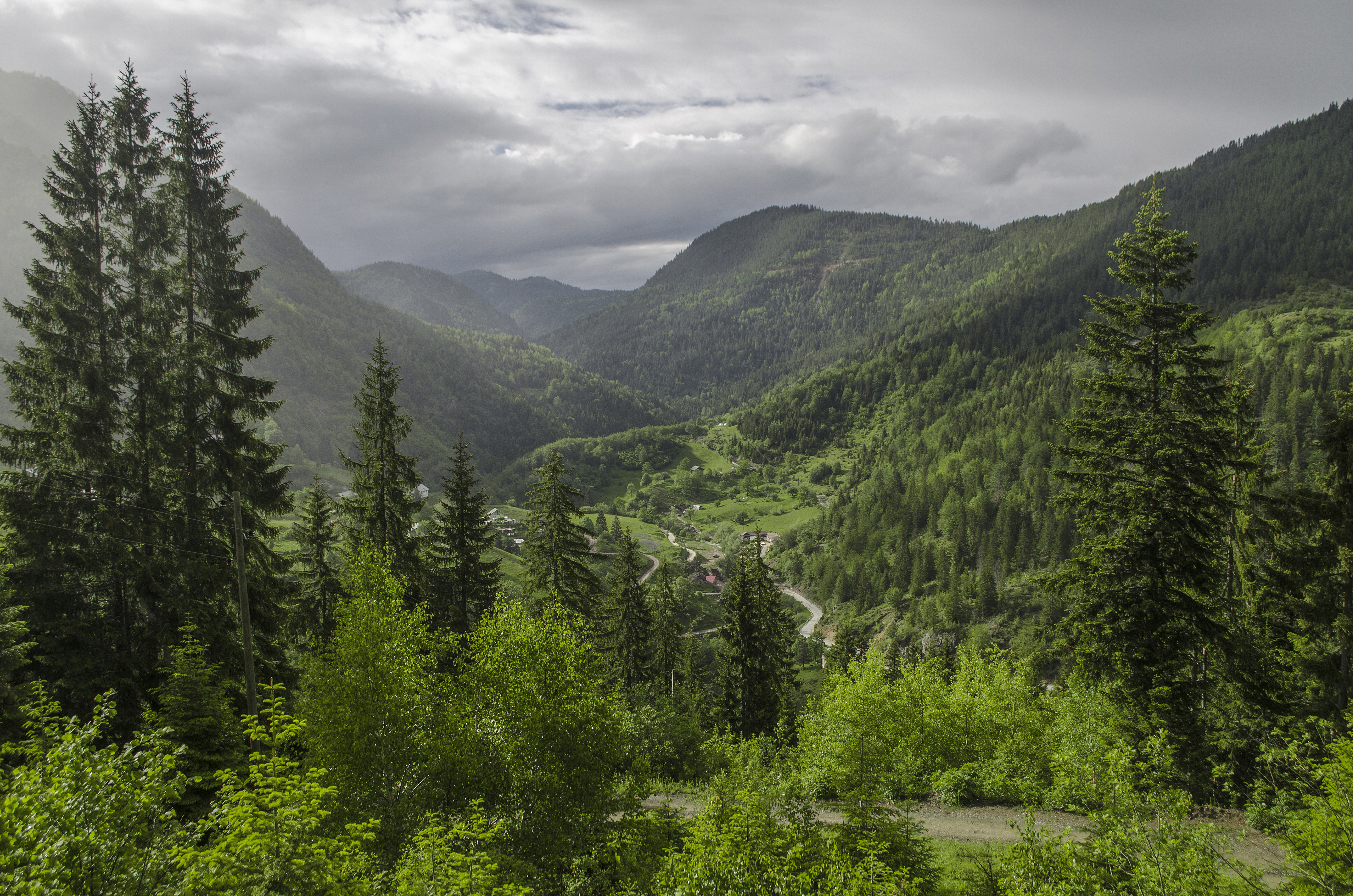 Gryka e Rugovës, Pejë